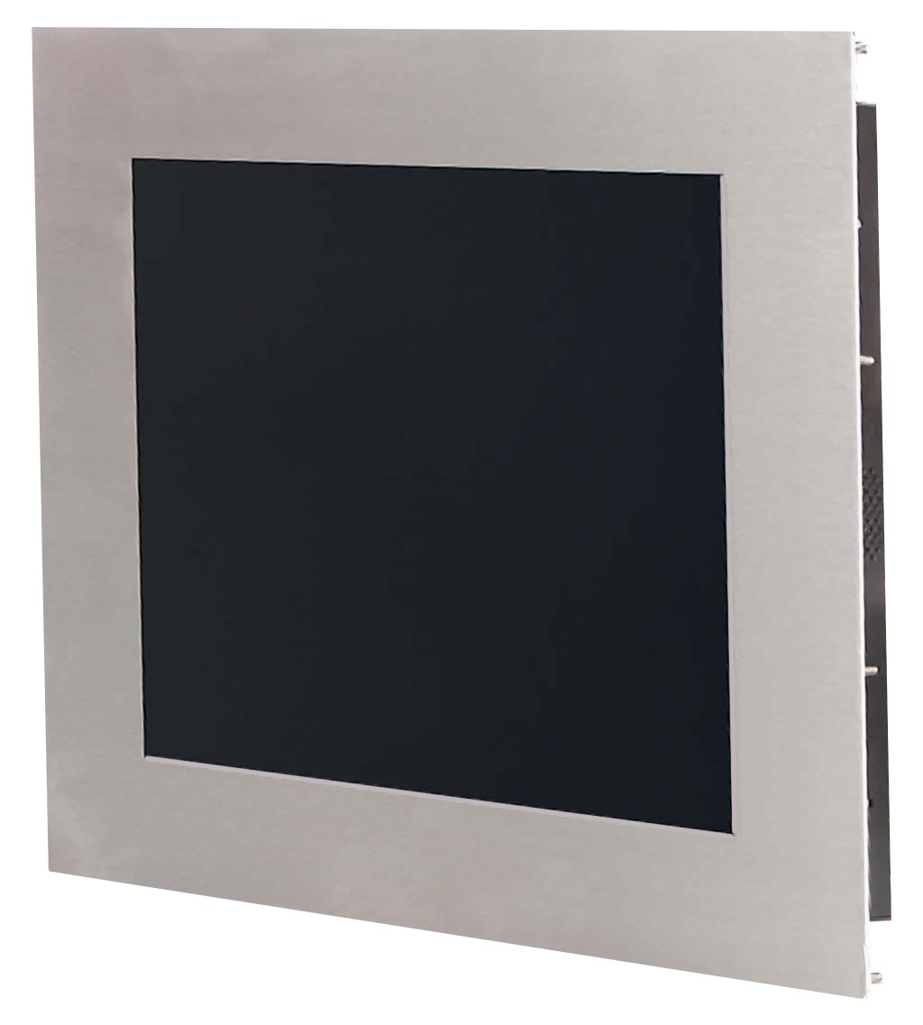 FP-17 Panel Mount LCD